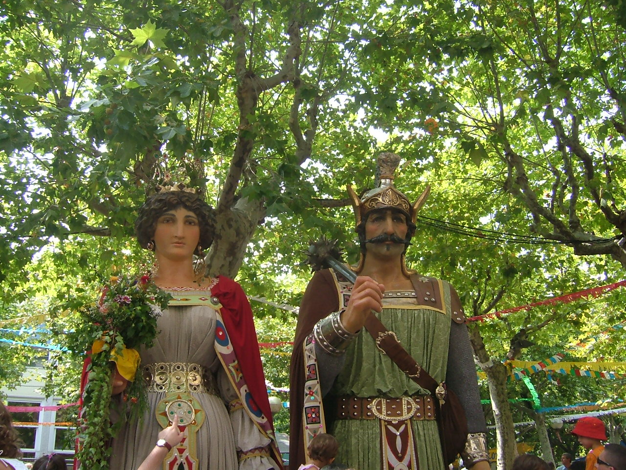 Gegants d'Olot